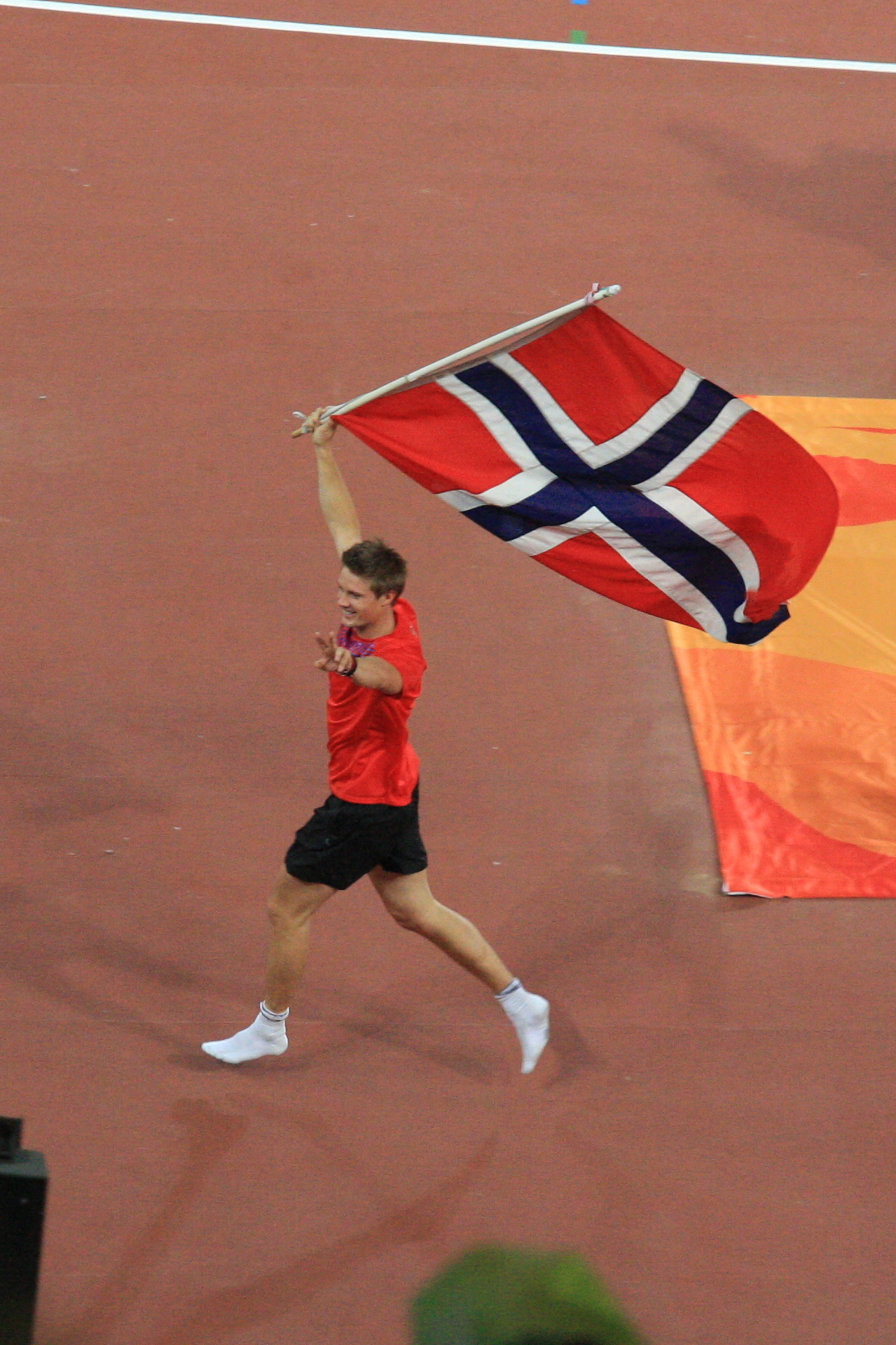 挪威的选手Thorkildsen获得了男子标枪的金牌。击败了芬兰的3位好手，包括Pitkamaki。